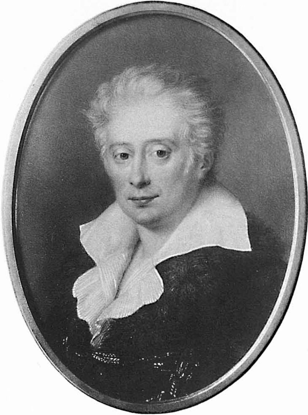 Николай Никитич Демидов (1773-1828)